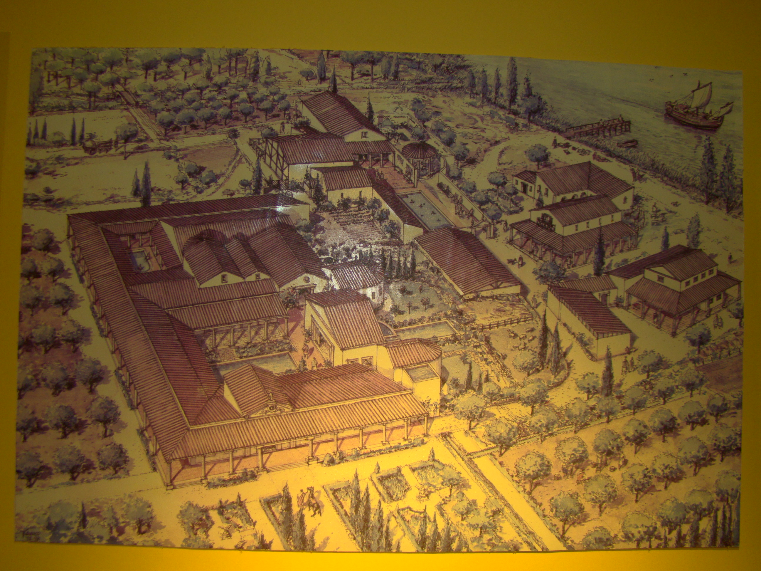 Ruinas Romanas de Milreu 2017 - Esquema da Villa